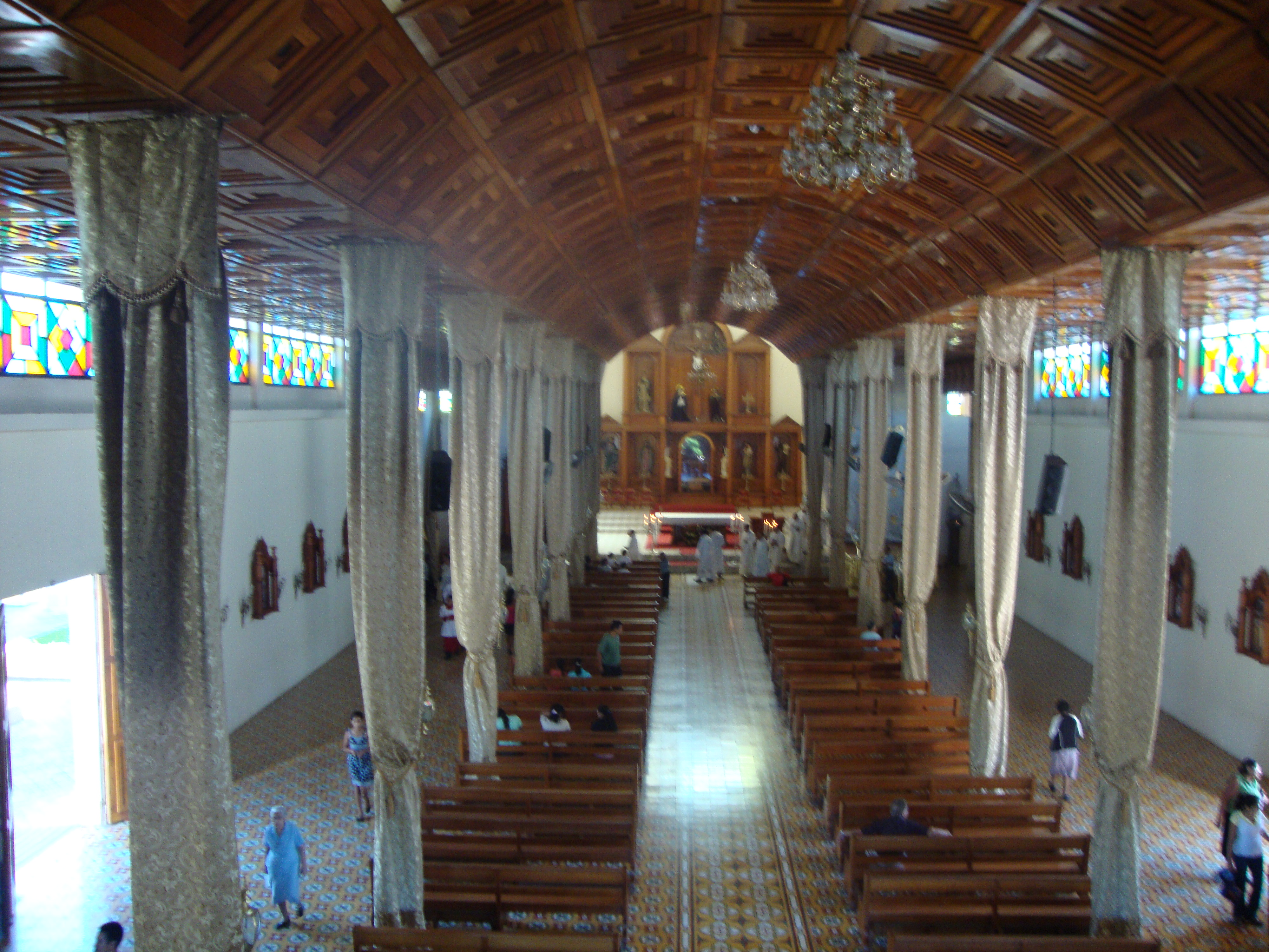 Durante las fiestas de la Diócesis 2010